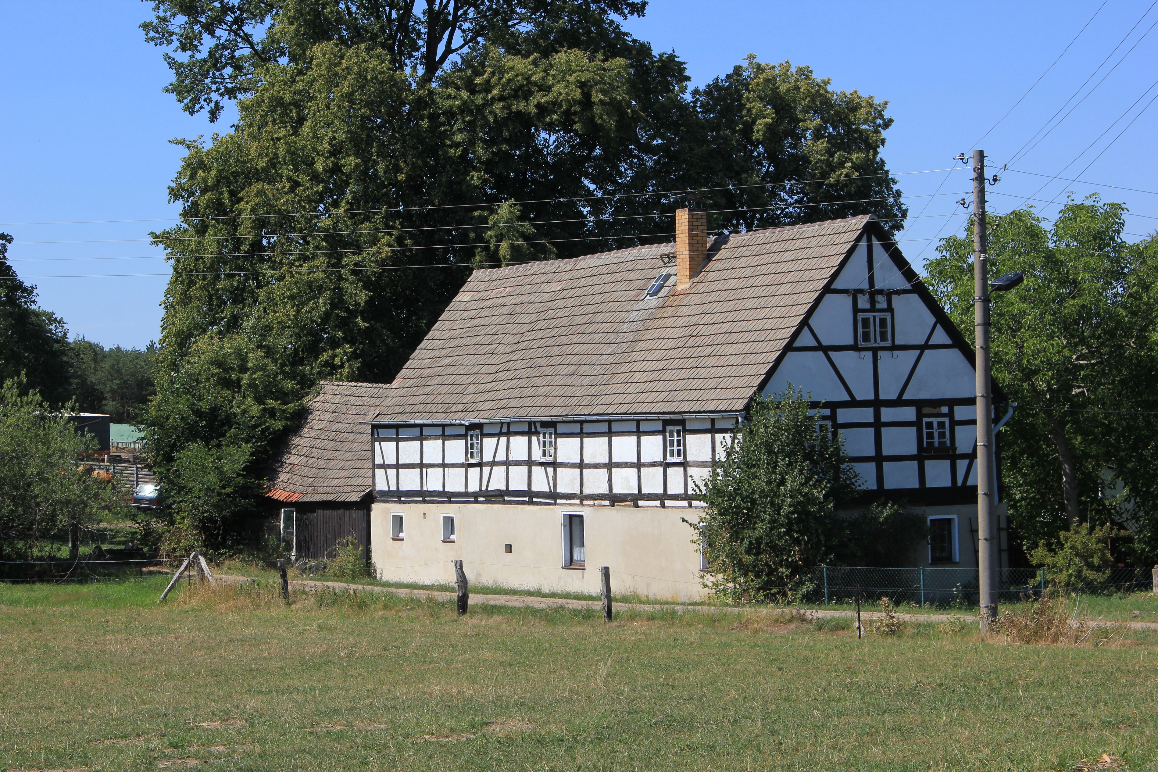 Hornjoserbsce: Liša Hora, čo. 2 (kulturny pomnik).